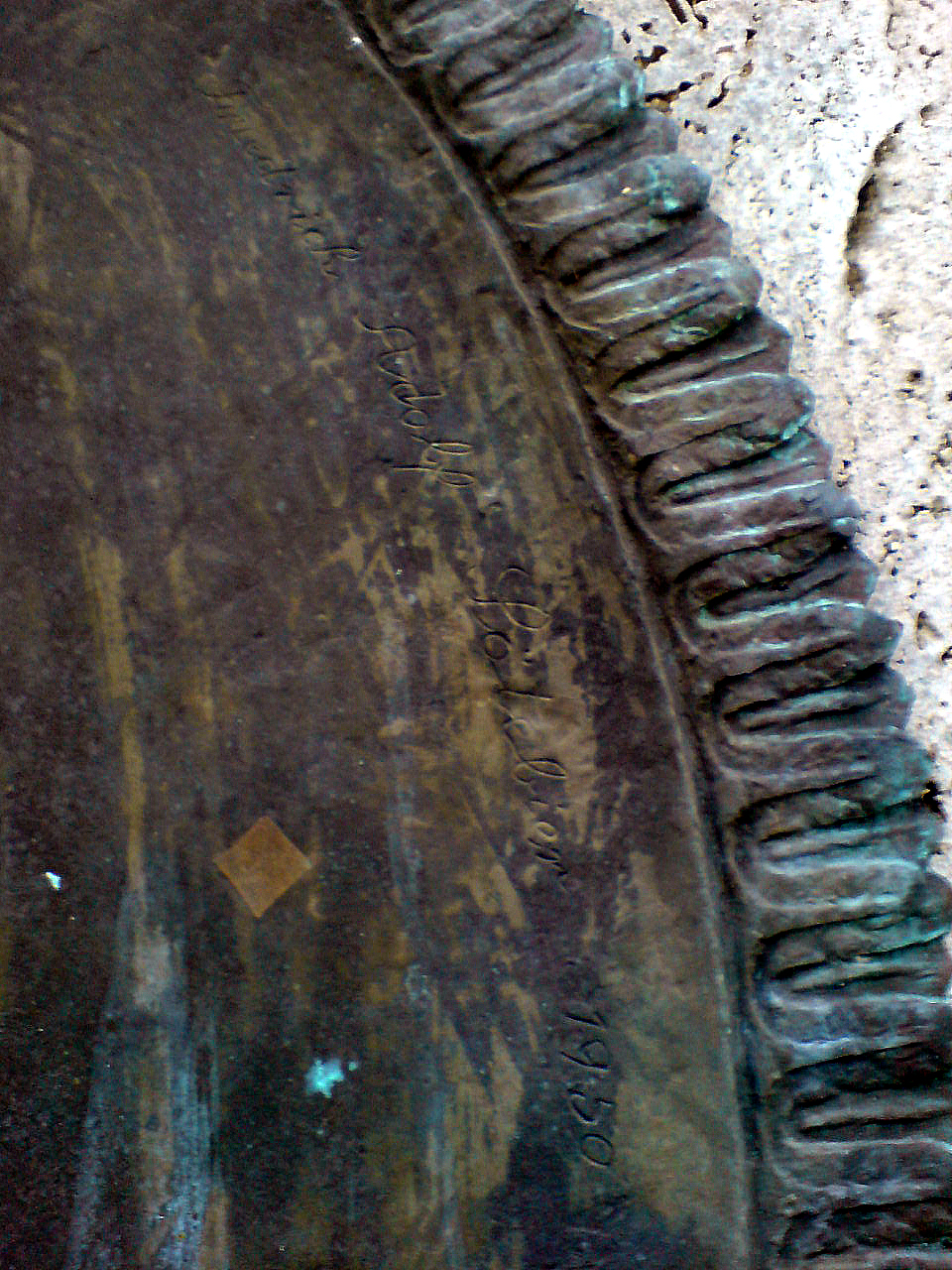 Künstlersignatur Friedrich Adolf Sötebier 1950 auf dem Helmke-Denkmal an der Herrenhäuser Allee